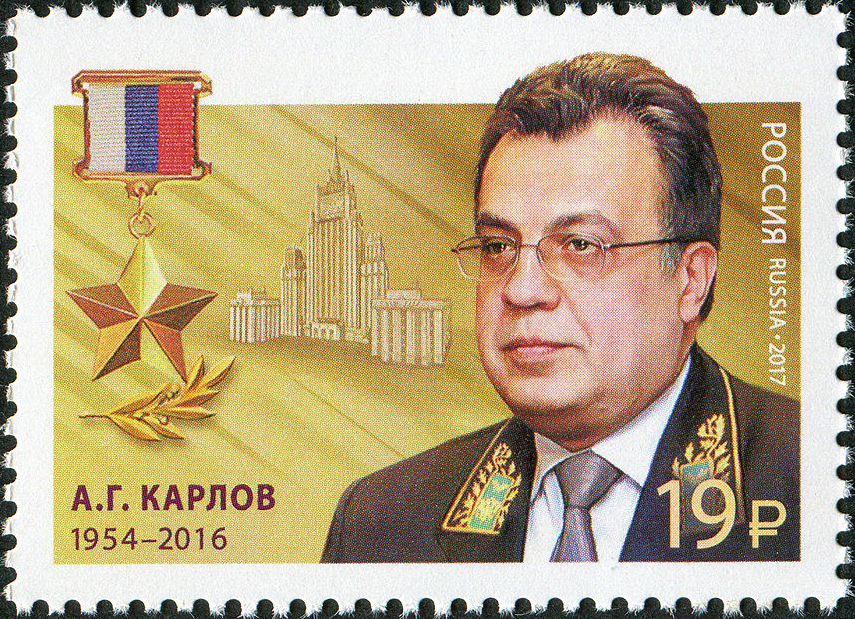 Andrei Karlov